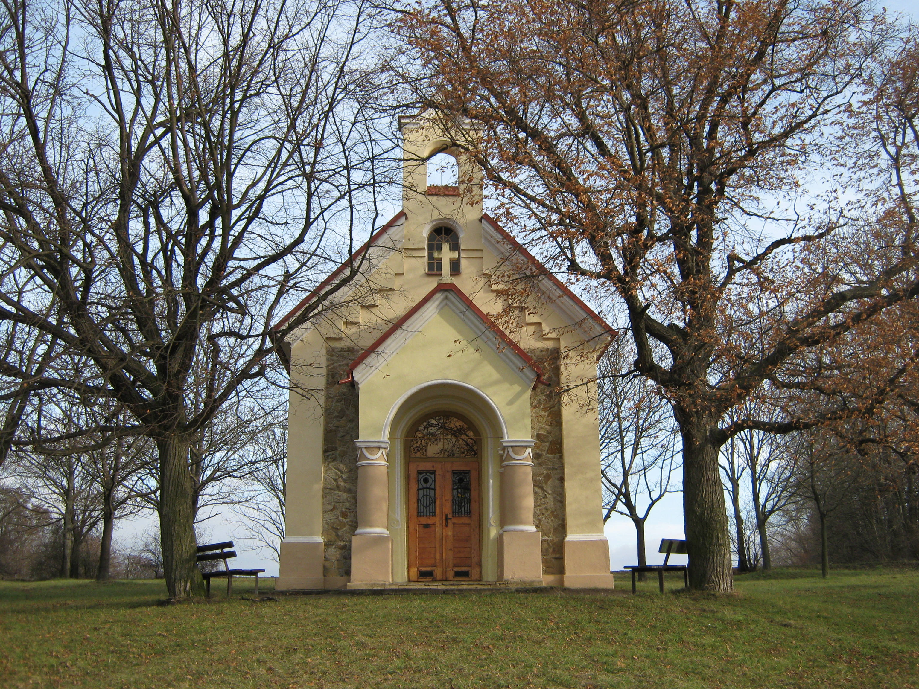 Kaple Nejsvětější Trojice v obci Nivnice (Zlínský kraj)